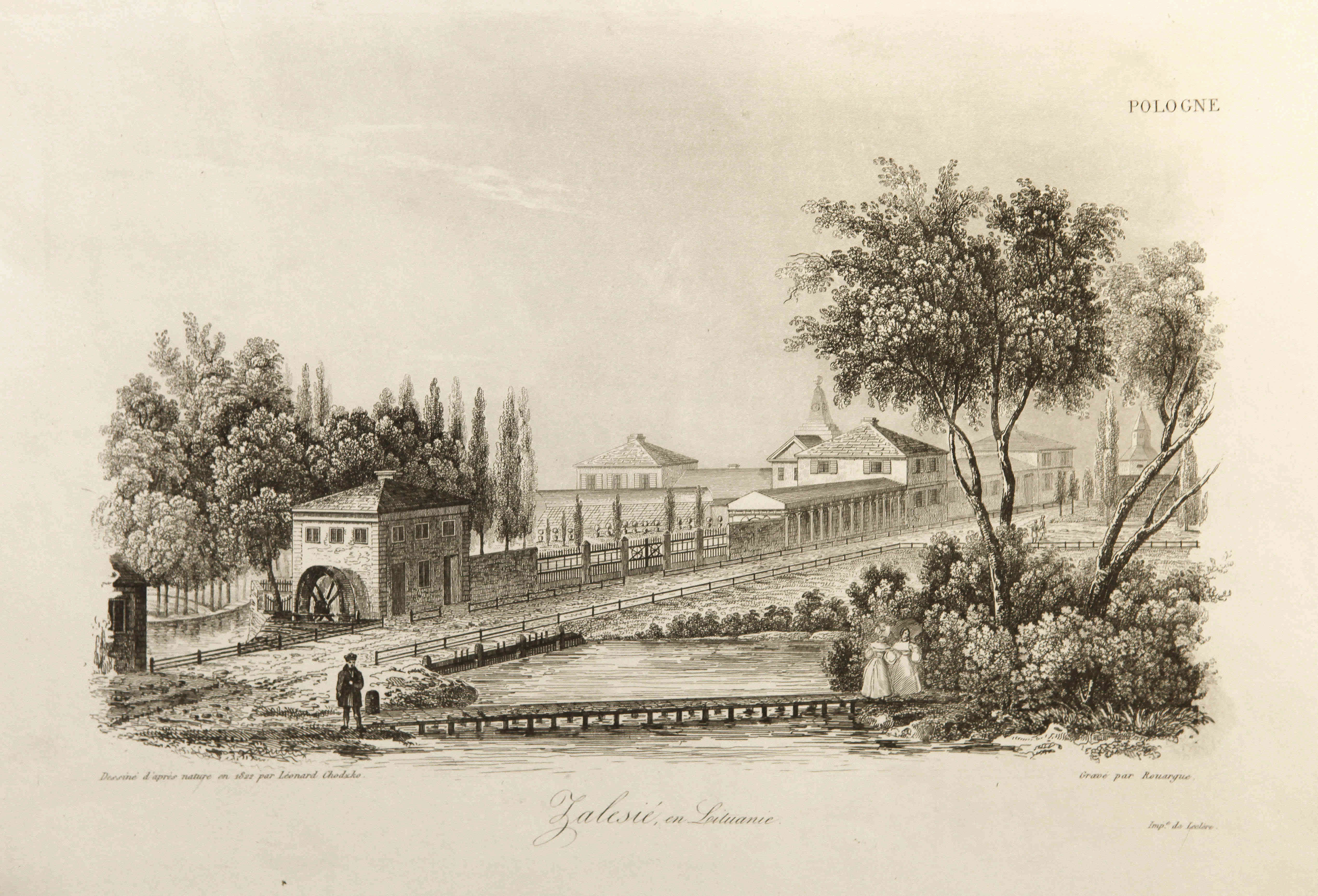 Залессе ў Літве. Маёнтак М. К. Агінскага Ходзька Леанард, ХIХ ст. Літаграфія 27,1×18,9 см Прыватная калекцыяБеларуская (тарашкевіца): Залесьсе (Zaleśsie), сядзіба Агінскіх (Aginski)